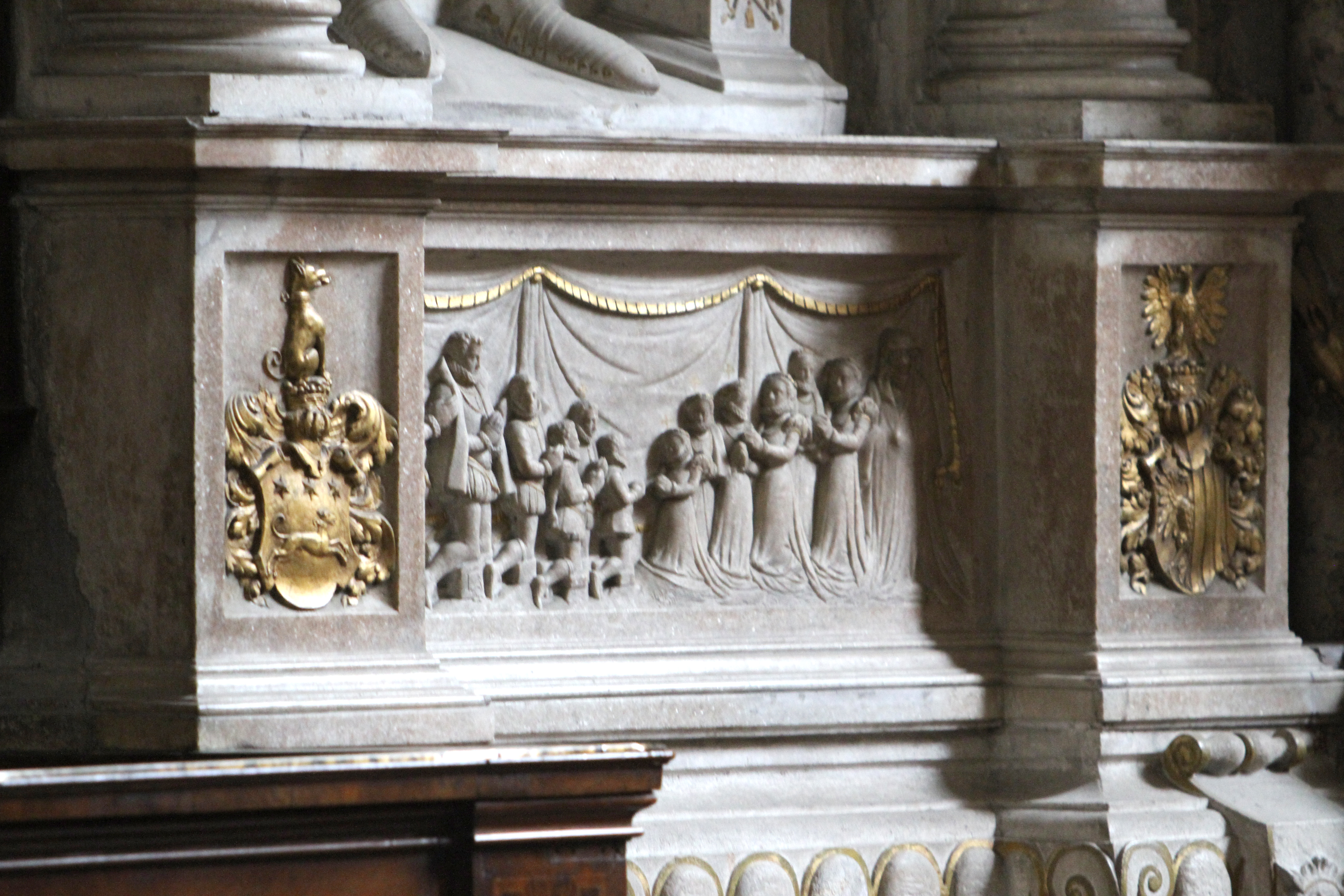 Epitaph des Peter von Mollard († 1576) im Altarraum der Michaelerkirche Wien